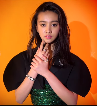 Koki,です。